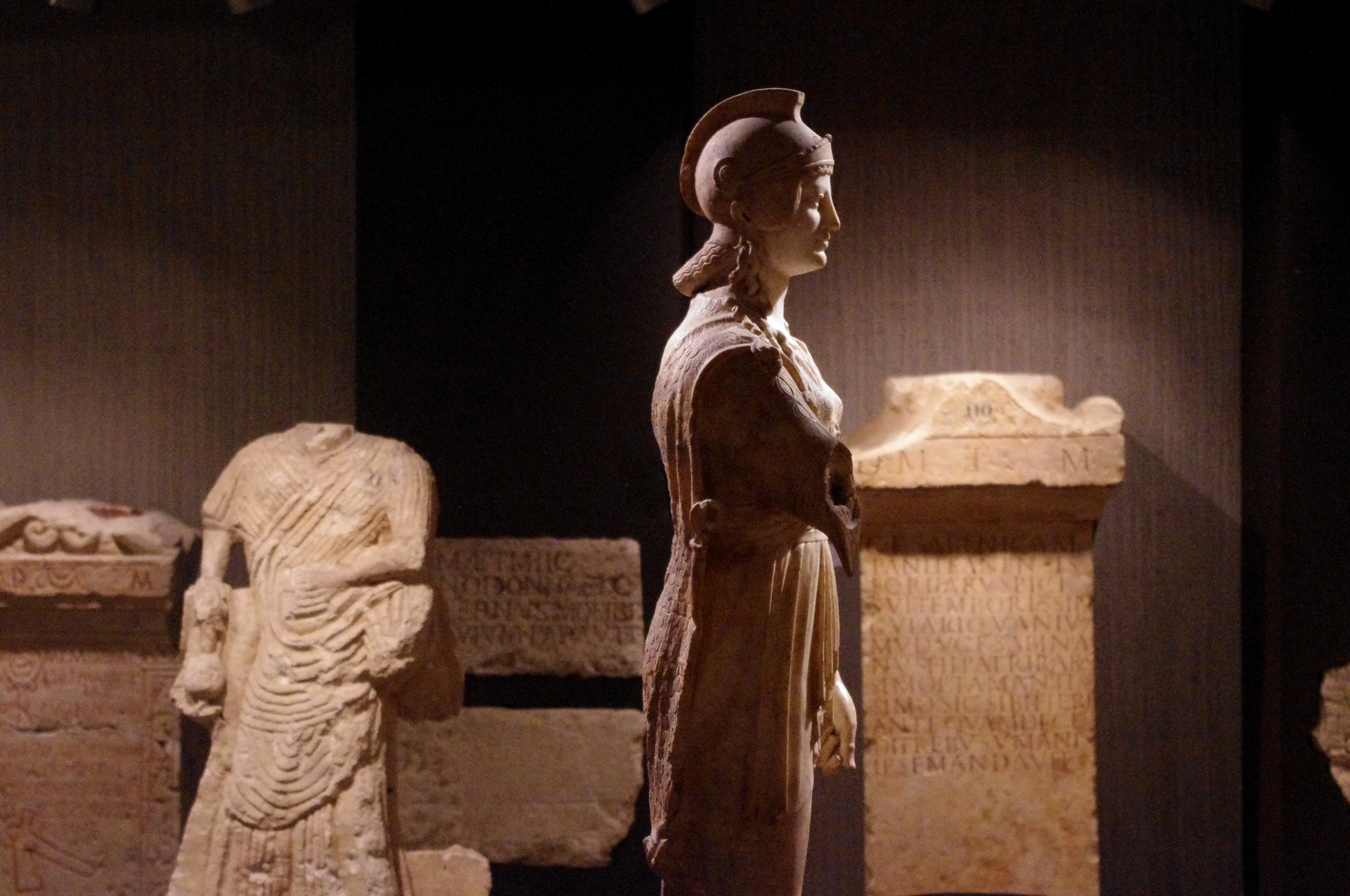 La Minerve de Poitiers, copie romaine d'après un original grec, découverte en 1901 à Poitiers et conservée au Musée sainte-Croix